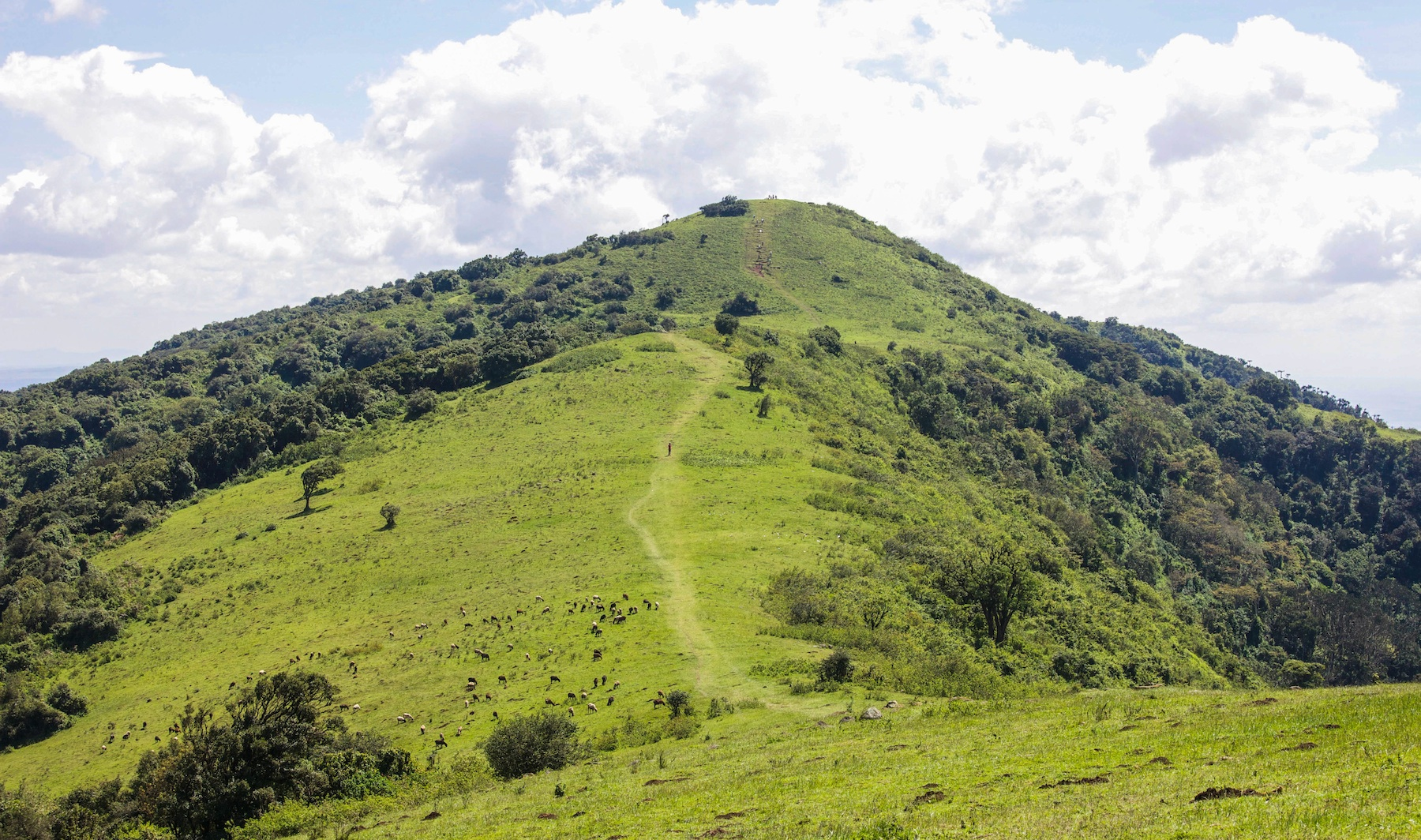 Hills in Ngong, Kenya